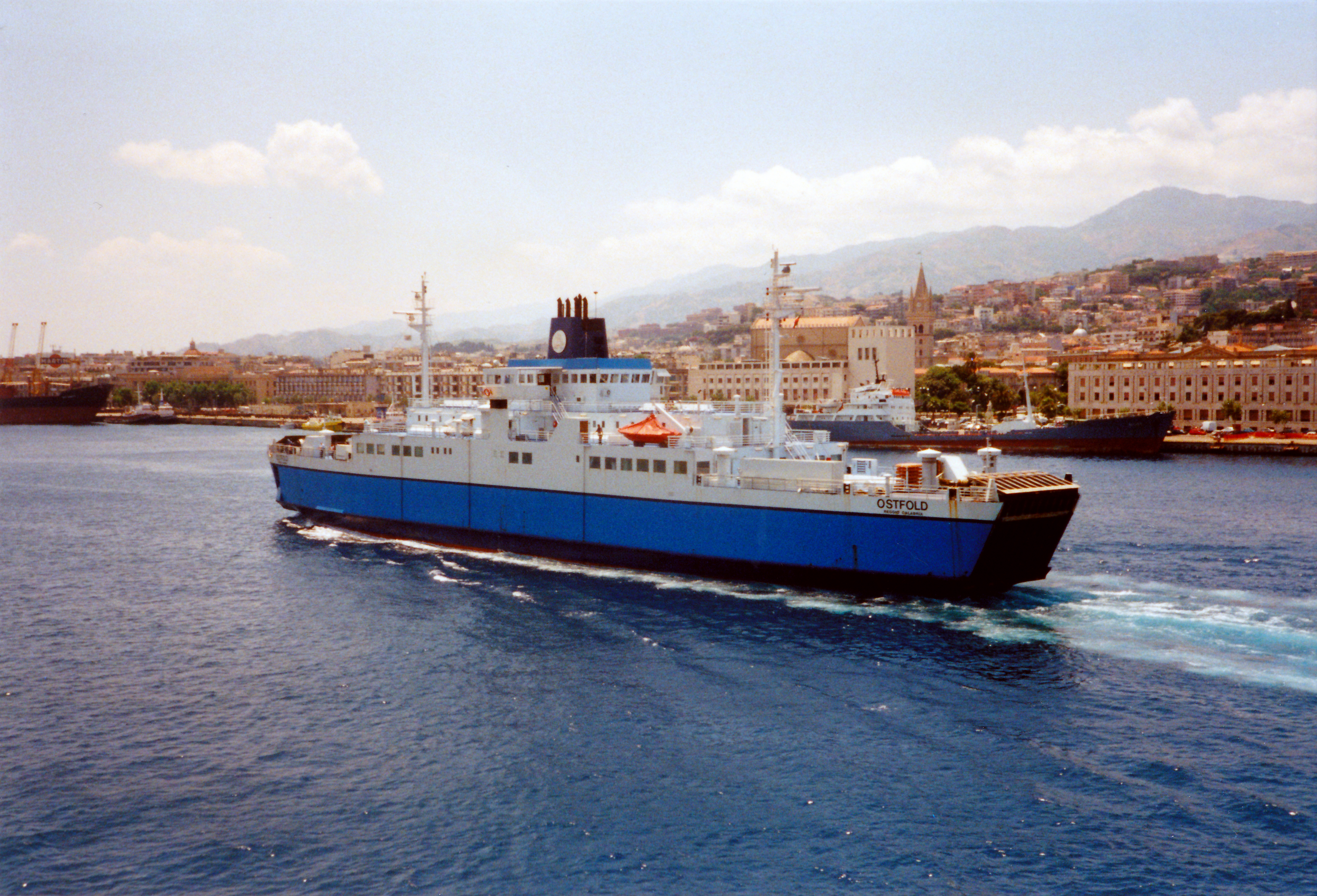 Messina - Villa San Giovanni